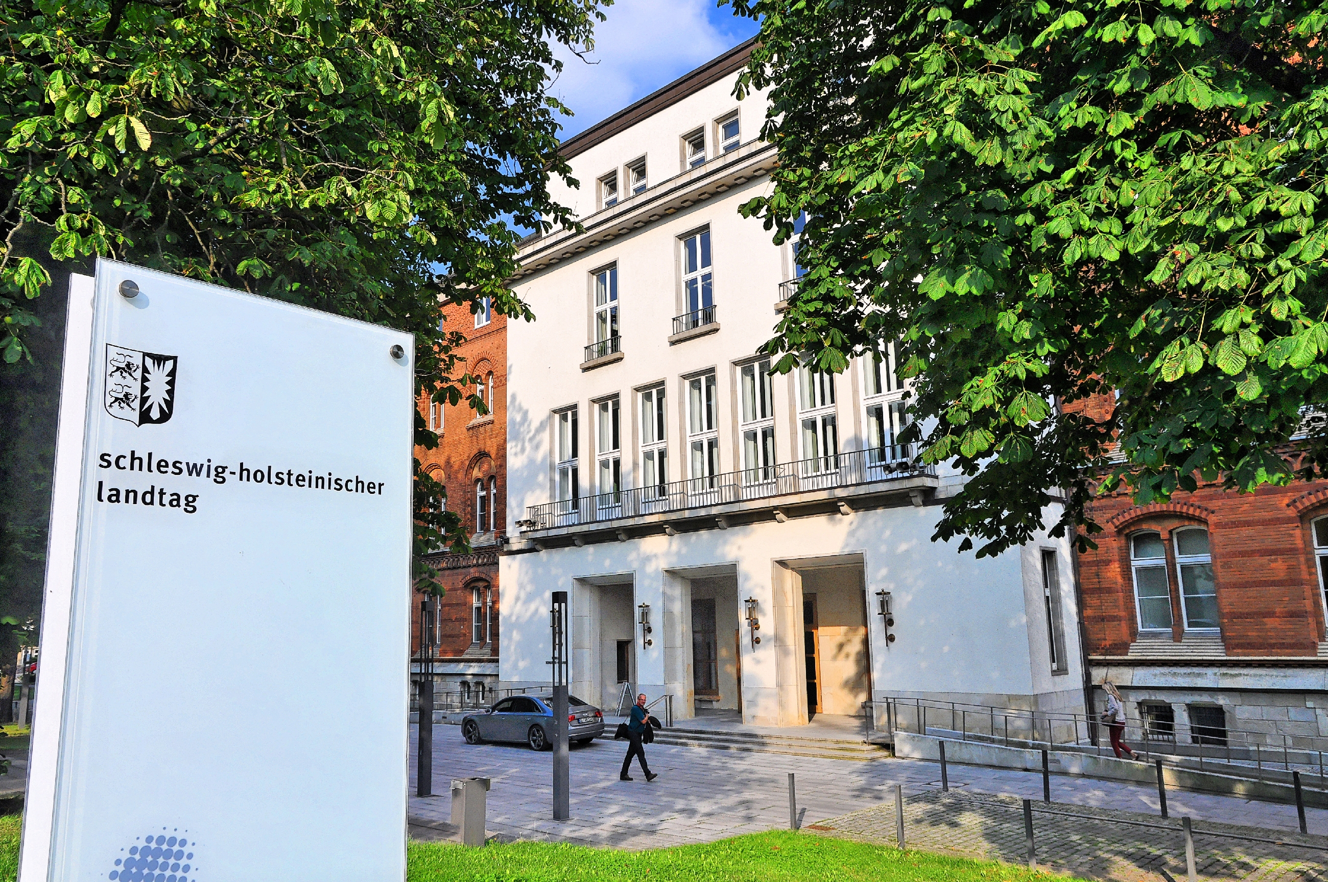 Kiel, Bilder wärend des Landtagsprojekt Schleswig-Holstein 2013